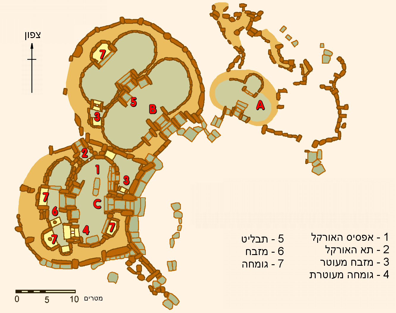 Plan des temples de Mnajdra